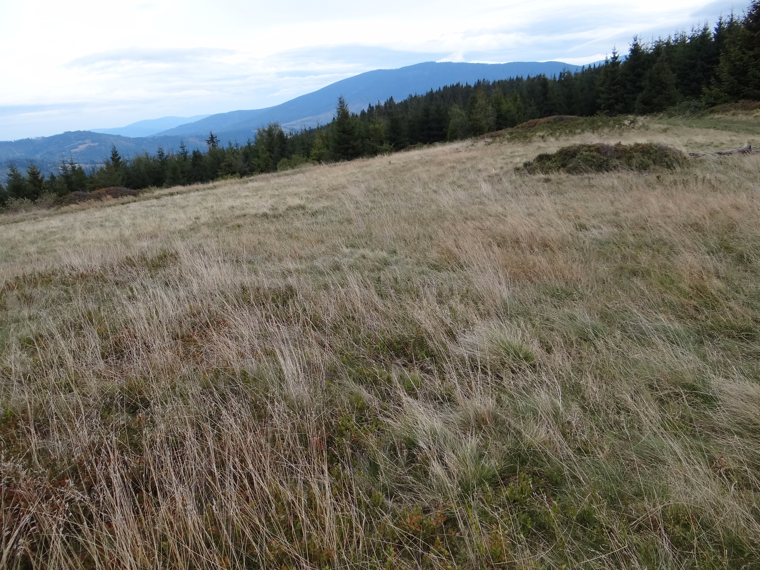 Polana na szczycie Prusowa